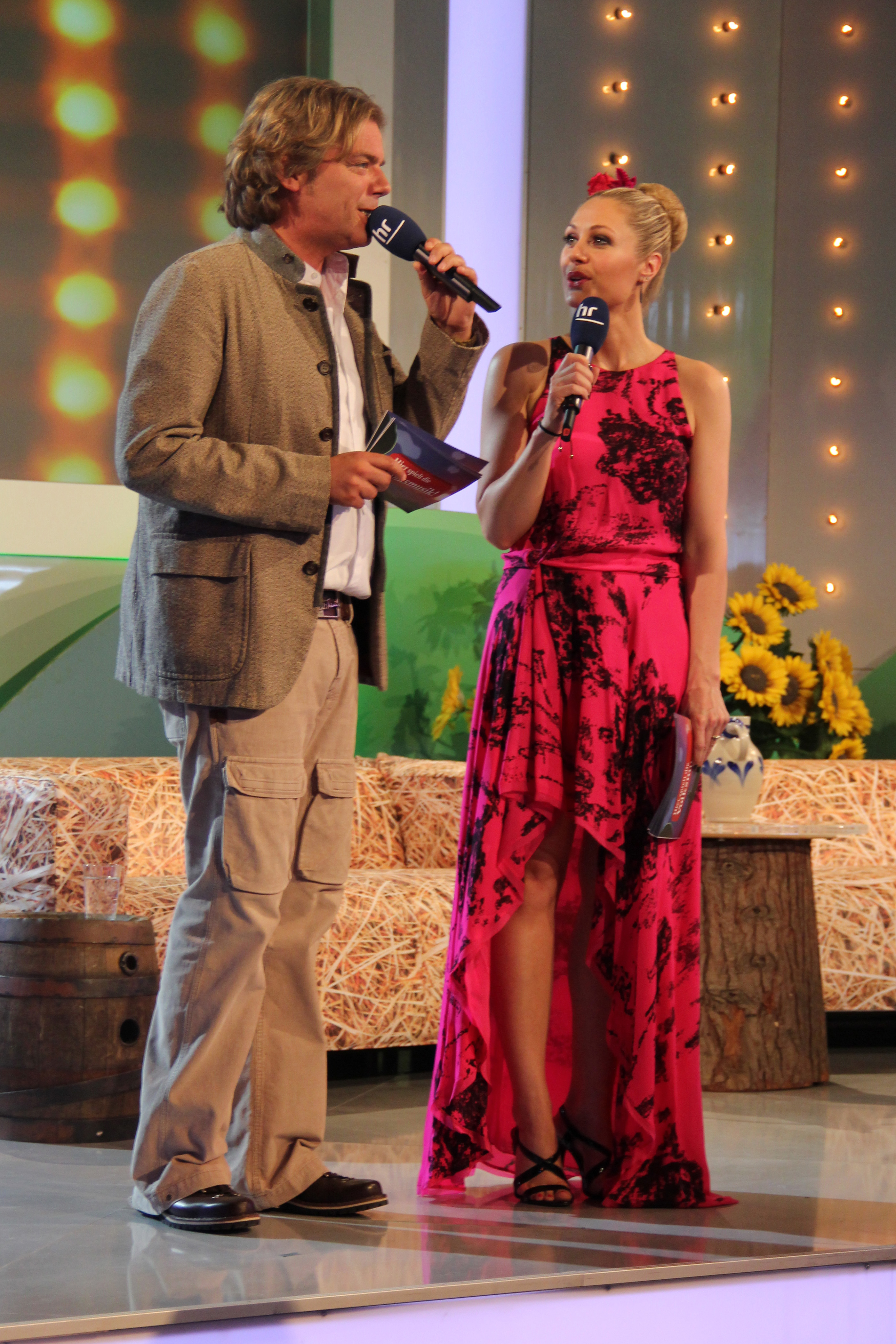 Ruth Moschner & Hubsi Trenkwalder bei der Aufzeichnung der HR Sendung "Hier spielt die Volksmusik" auf dem Hessentag 2013 in Kassel